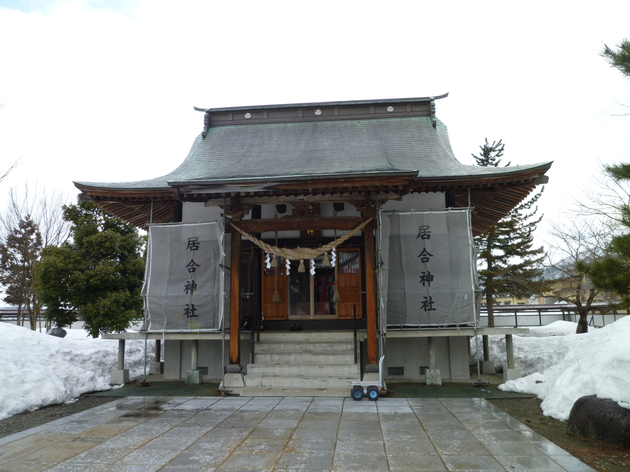 熊野居合両神社拝殿。通称居合神社。山形県村山市林崎に所在。